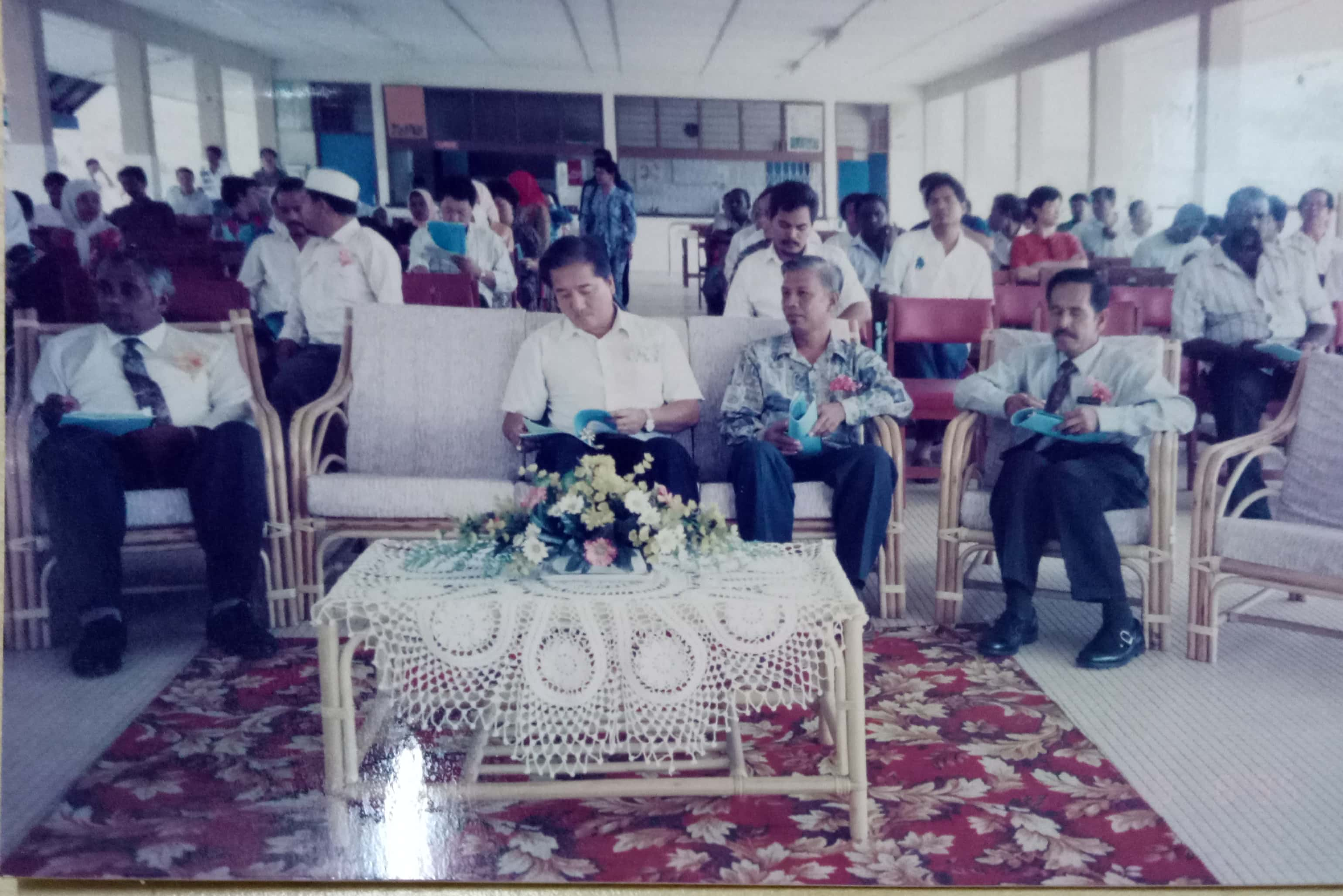 Kehadiran Ibu Bapa